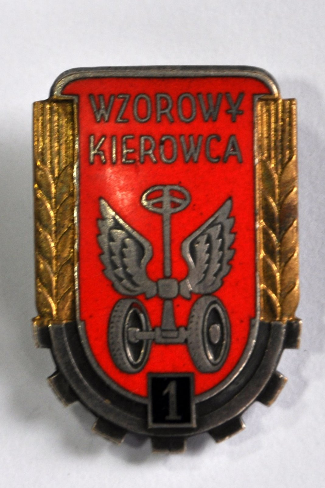 Odznaka Wzorowy Kierowca